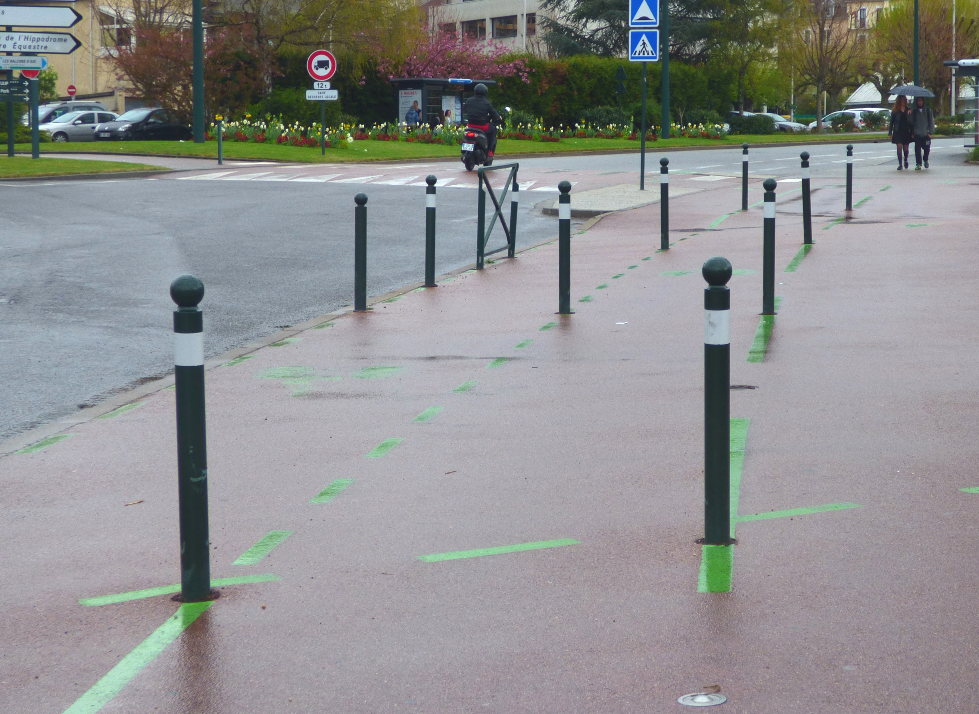 Des potelets et une barrière de ville sur un trottoir partagé à Aix-les-Bains.